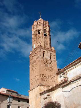 Torre de la Iglesia de la Asunción de Navarrete del Río, Teruel, España; de estilo mudéjar aragonés.